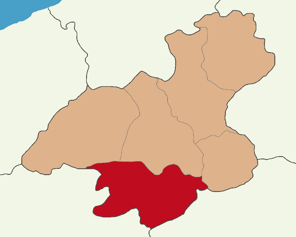 Eskipazar ilçesinin konumu